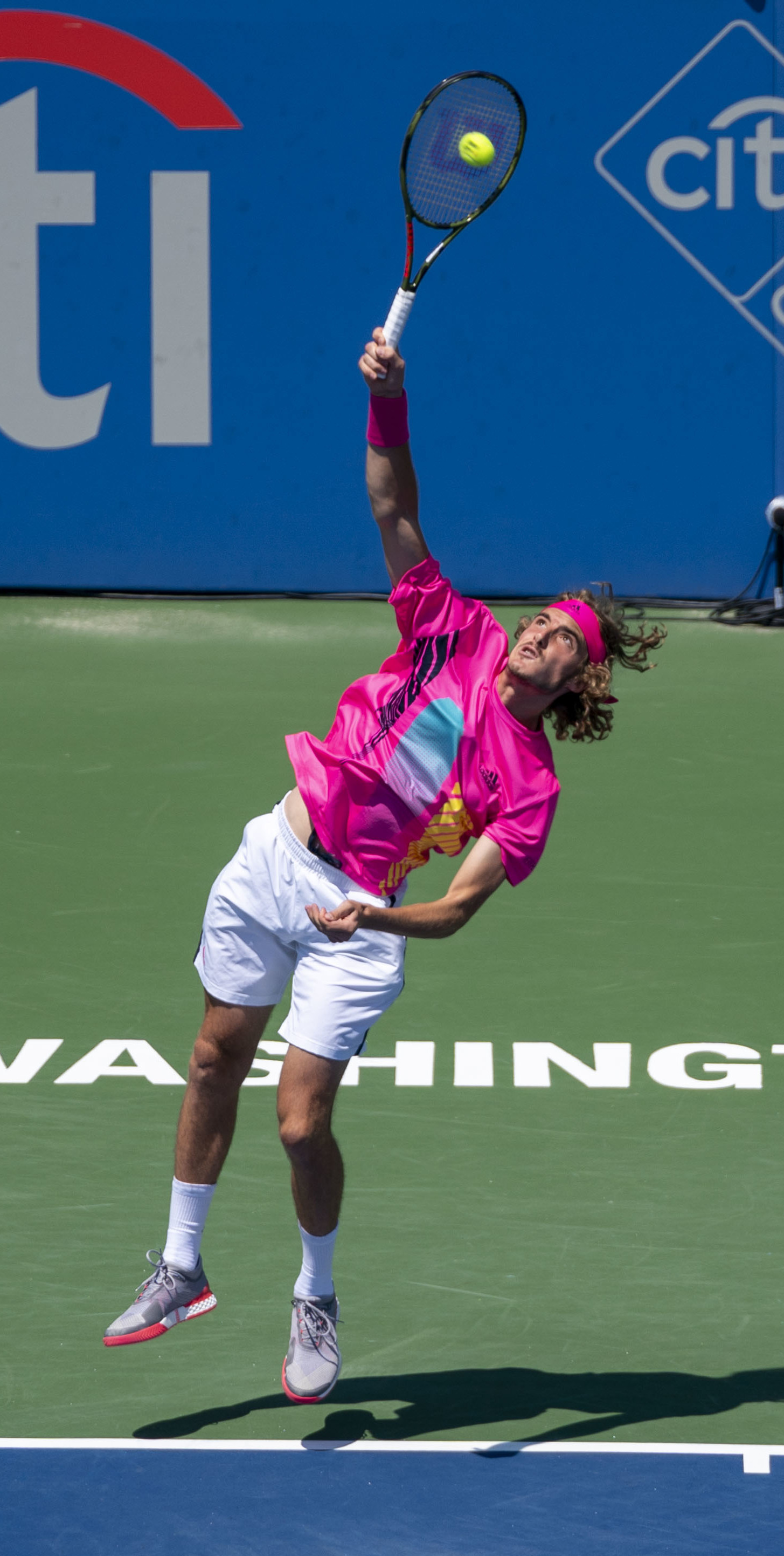 2018 Citi Open Tennis